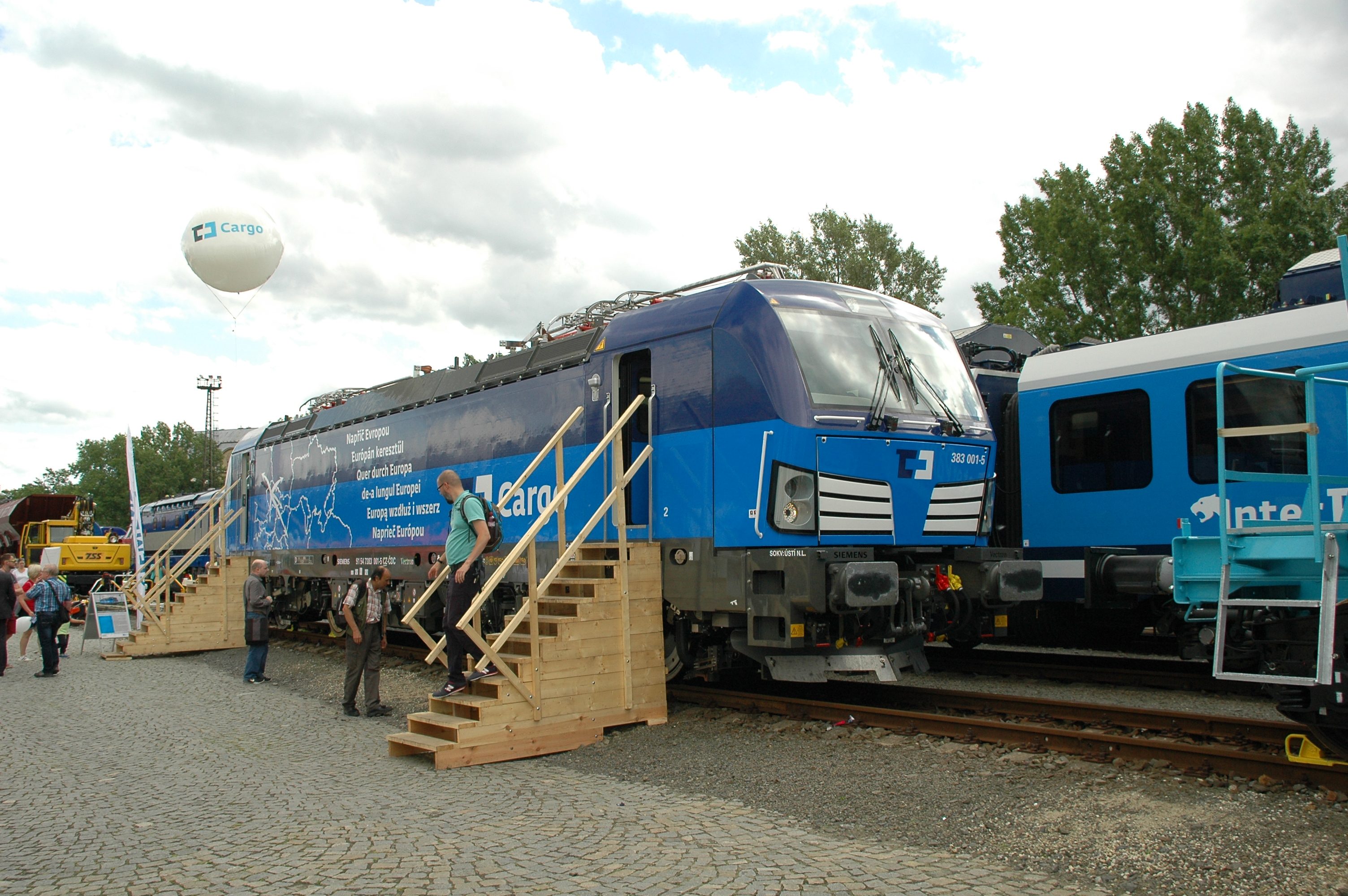 Nový Vectron ČD Cargo